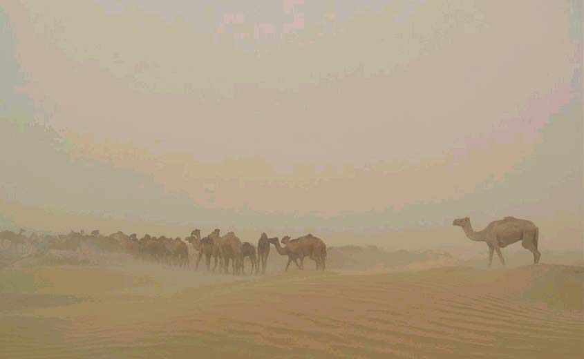 bei Nimroz